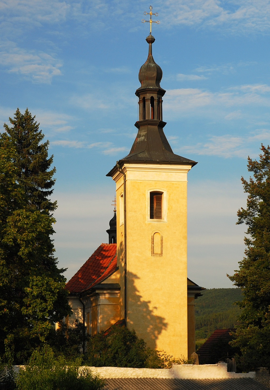 Kostel sv. Václava v Loděnici na náměstí